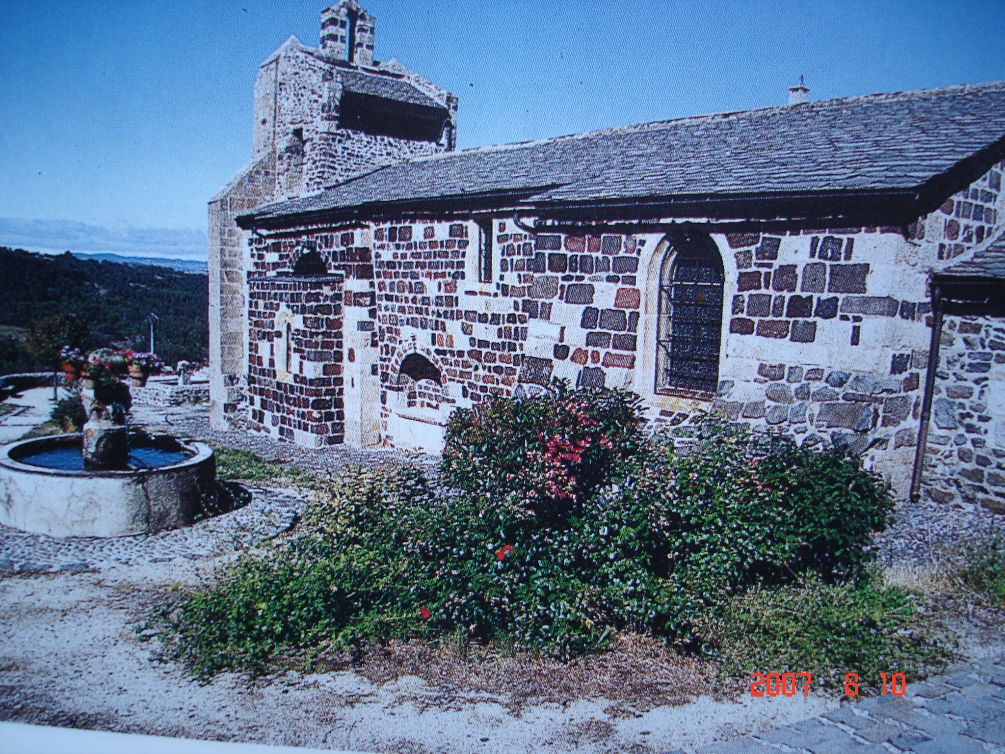 Le Monastier-sur-Gazeille (dép. Haute-Loire, France) : église préromane Saint-Jean-Baptiste, côté sud-est.